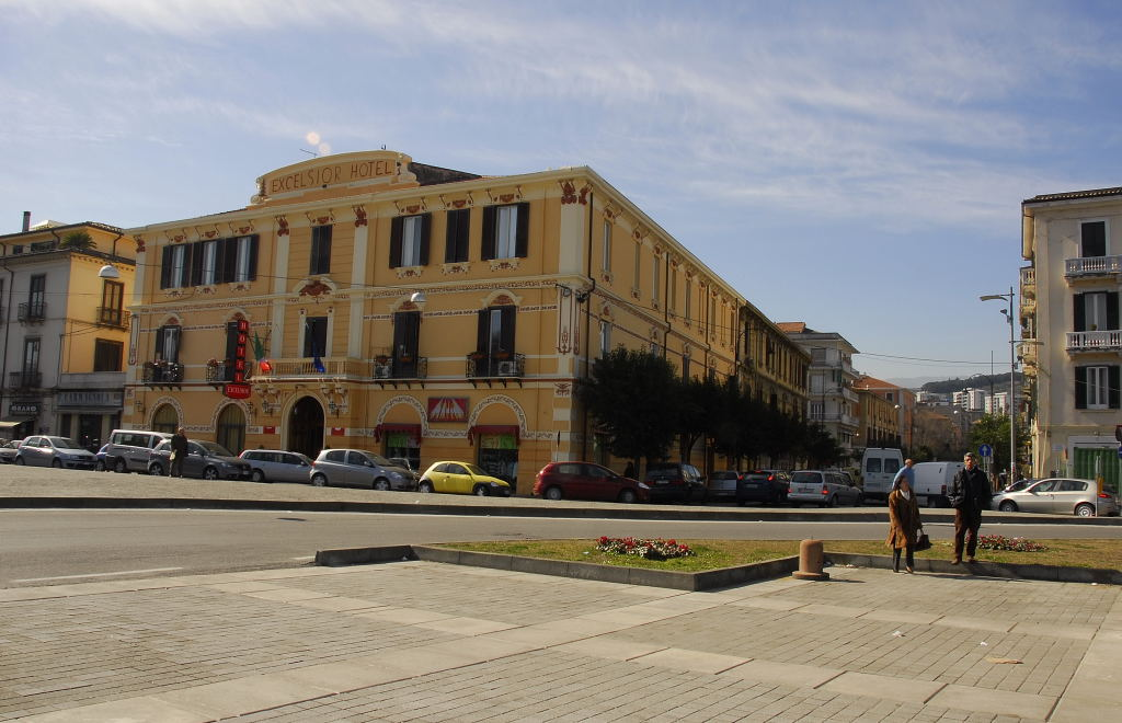 Cosenza, ITA